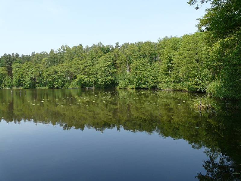 Jezioro Płytkie - g. Brody